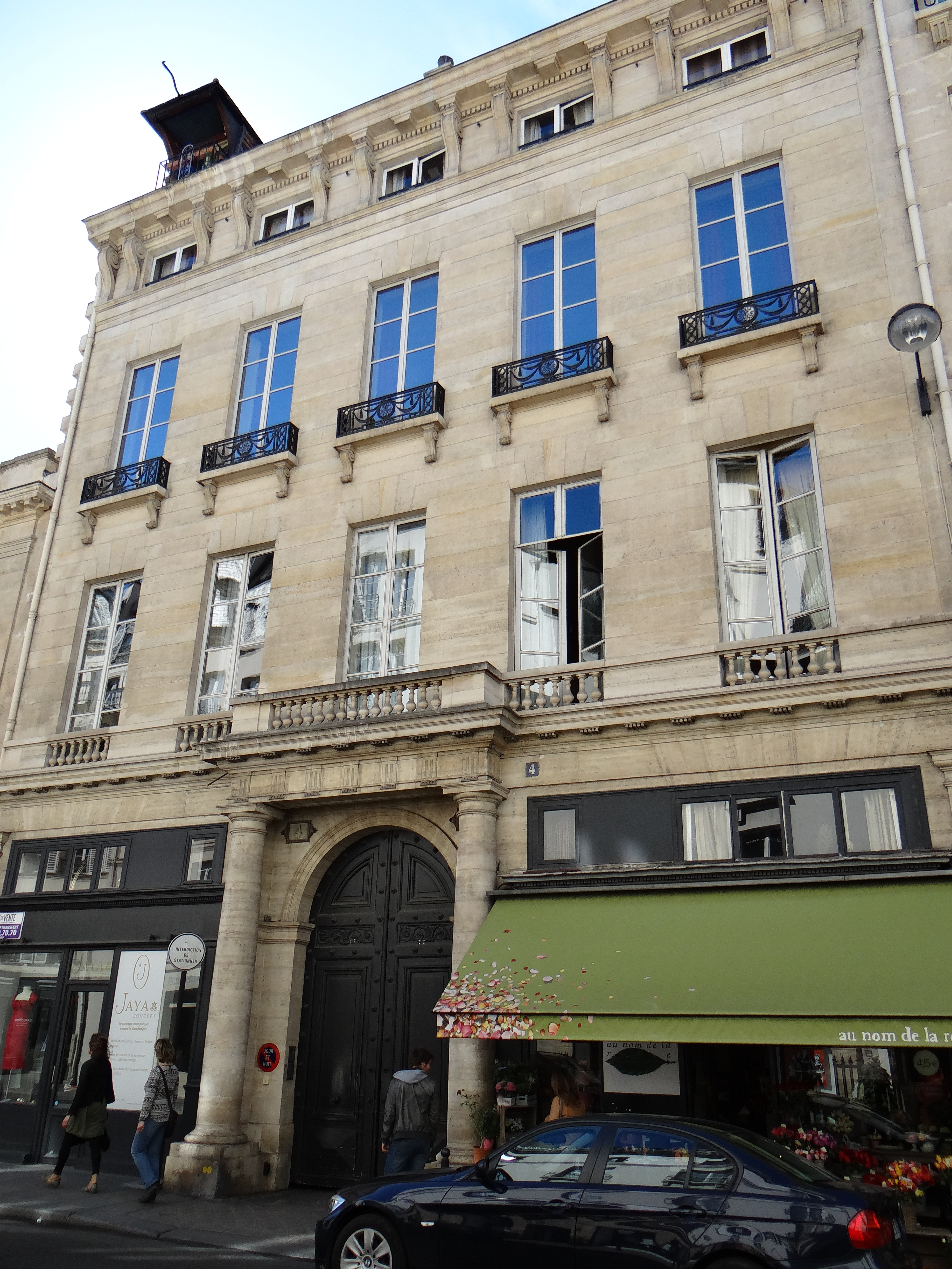 Hôtel de Montmorency-Fosseux - 4, rue de Tournon. L'ancien président Jacques Chirac vit à cette adresse de fin 2015 à sa mort le 26 septembre 2019, installé dans un appartement au rez-de-chaussée côté cour prêté par son ami François Pinault.